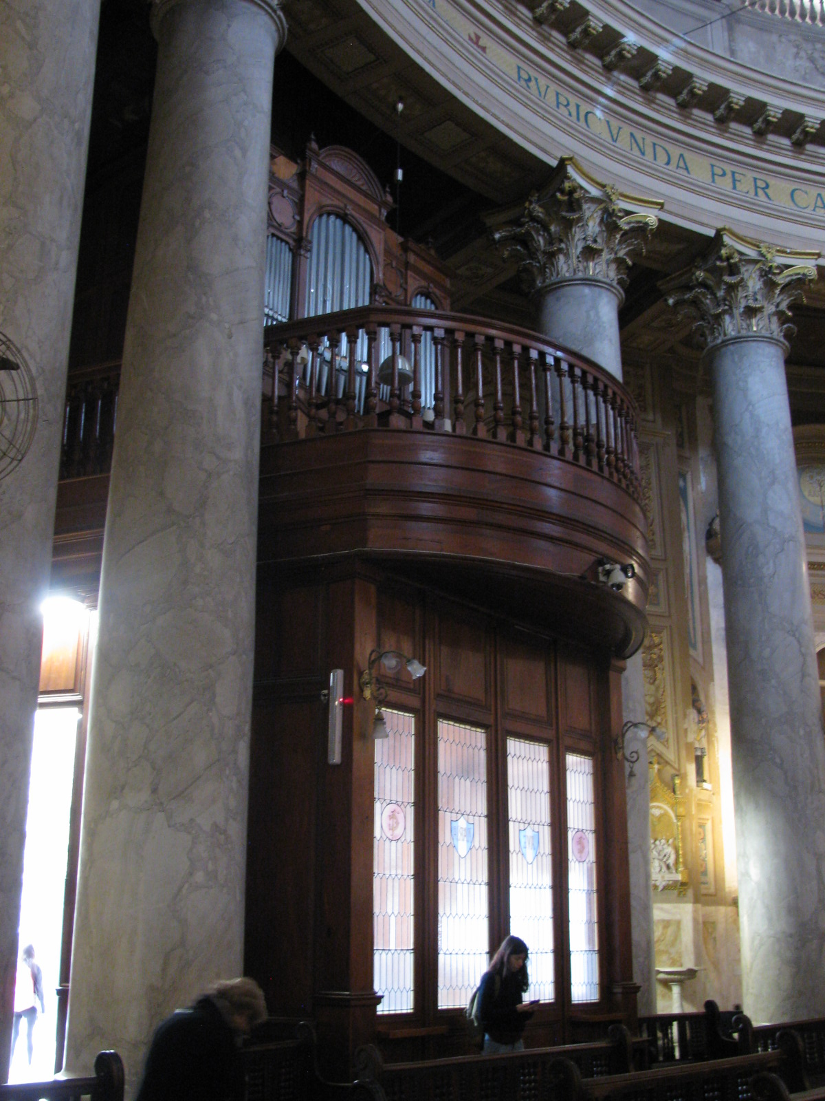 Órgano